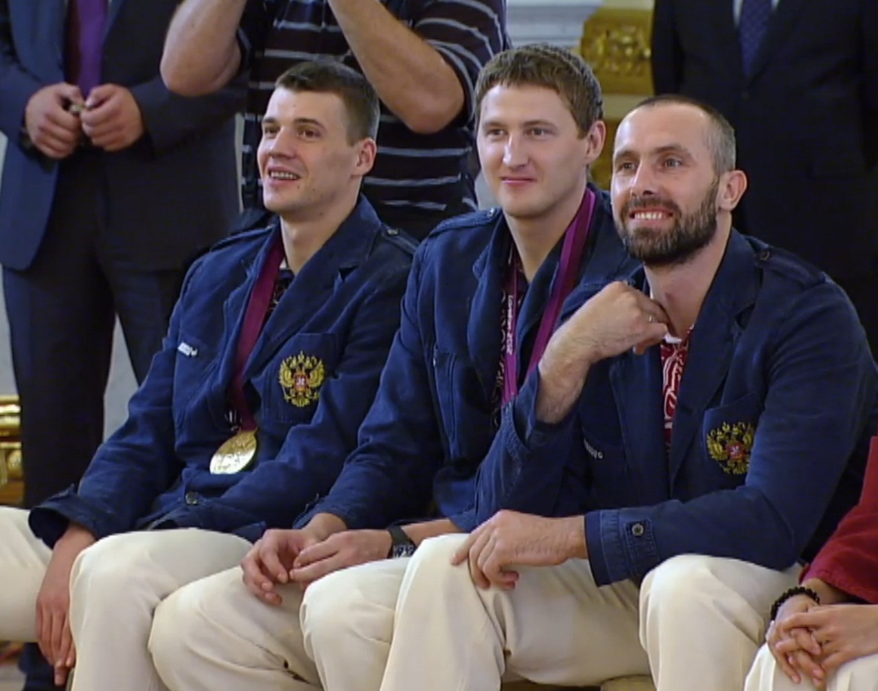 Встреча победителей и призёров Олимпийских игр 2012 года с президентом России на вручении государственных наград 16 августа 2012